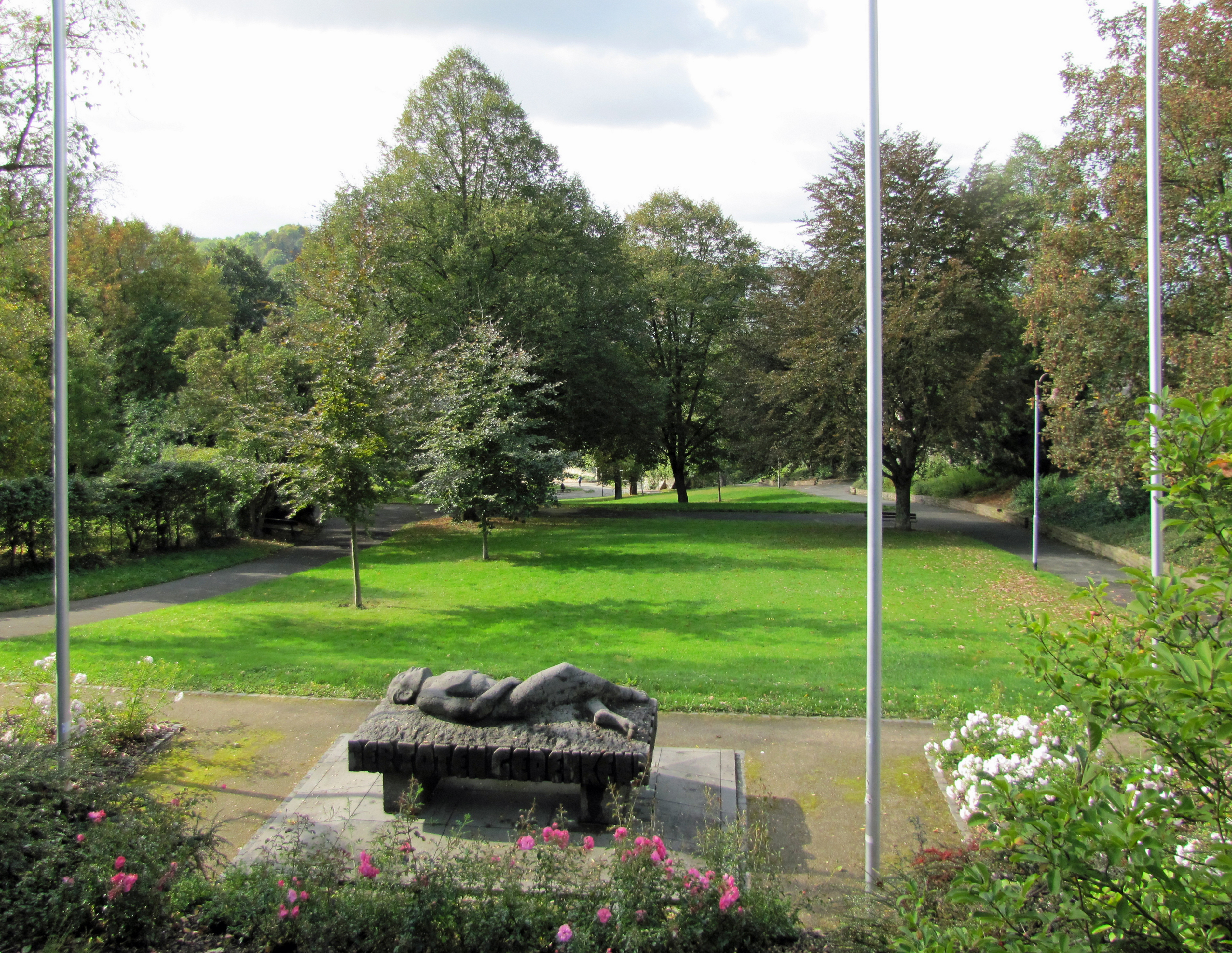 Die Avignon-Anlage in Wetzlar mit dem Opfer-Mahnmal, von der Oberturmstrasse gesehen.